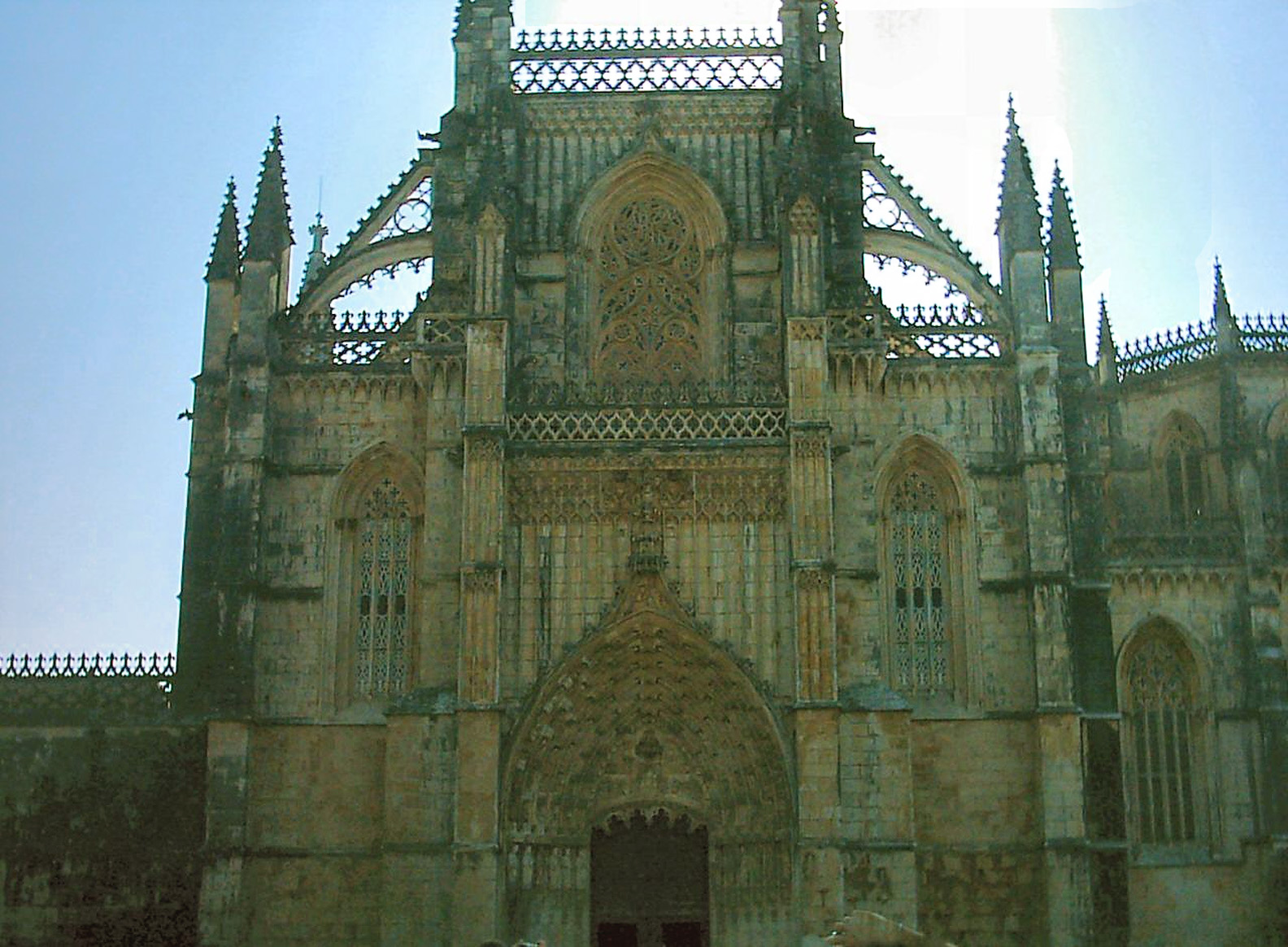 Mosteiro da Batalha, Portugal